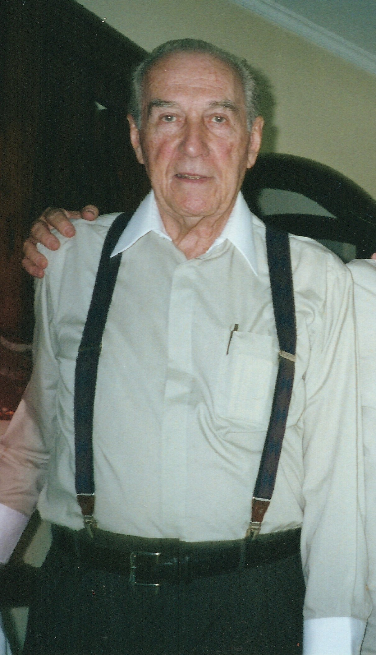 Tito Lívio Fleury Martins (1918 — 2012), radialista, jornalista, redator, repórter, locutor, comentarista, cronista, ator, radioator, diretor de radionovelas e radioteatro, produtor, cantor, apresentador, empresário, construtor, militar e advogado brasileiro.